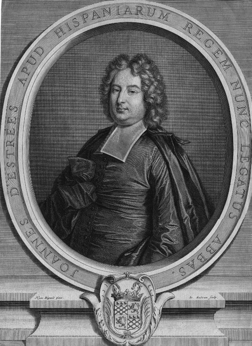 Portrait of Jean d'Estrées